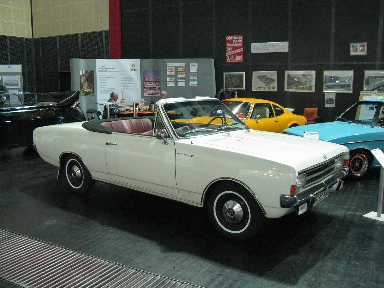 Karosserie Deutsch